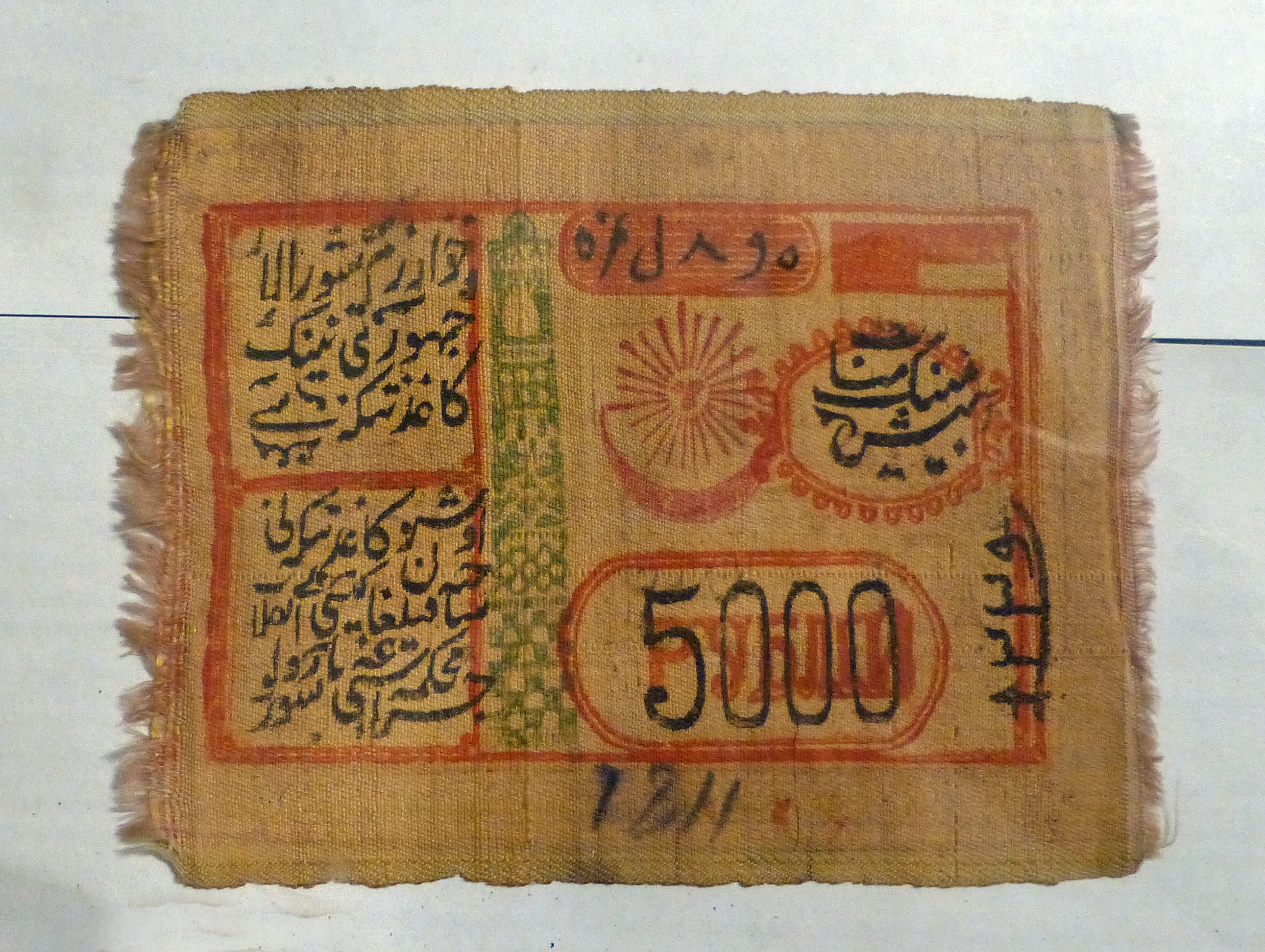 Billet de banque en soie de l'ancienne République de Khorezm. Museum of Ancient Khorezm (Khiva, Ouzbékistan)